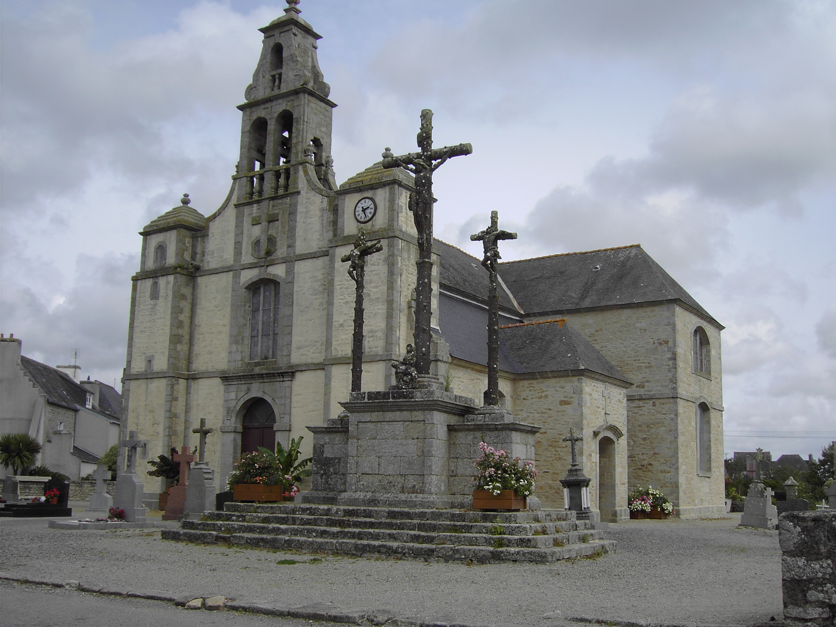 église de plomeur